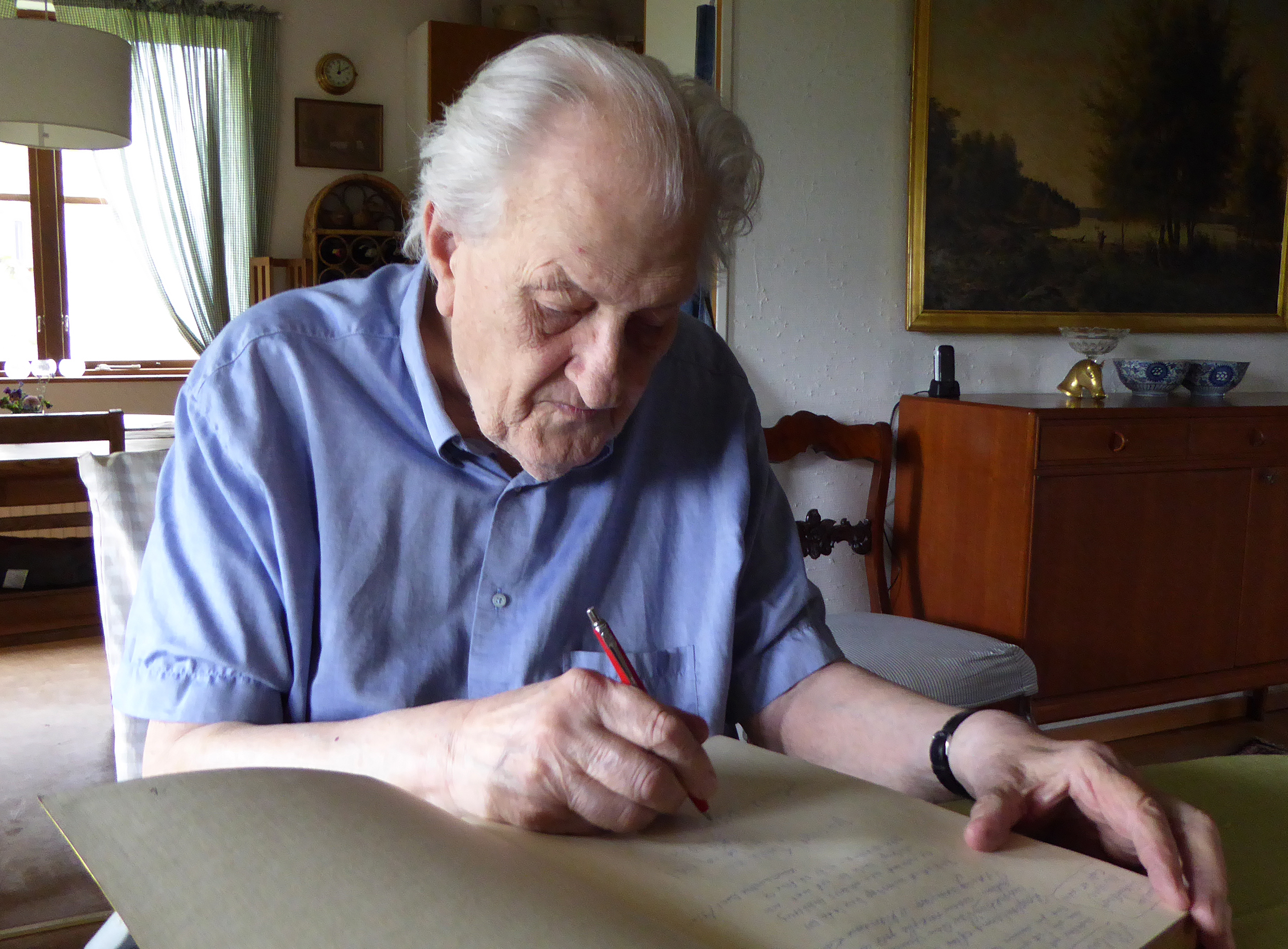 Lars Olof Lagerqvist i maj 2015.